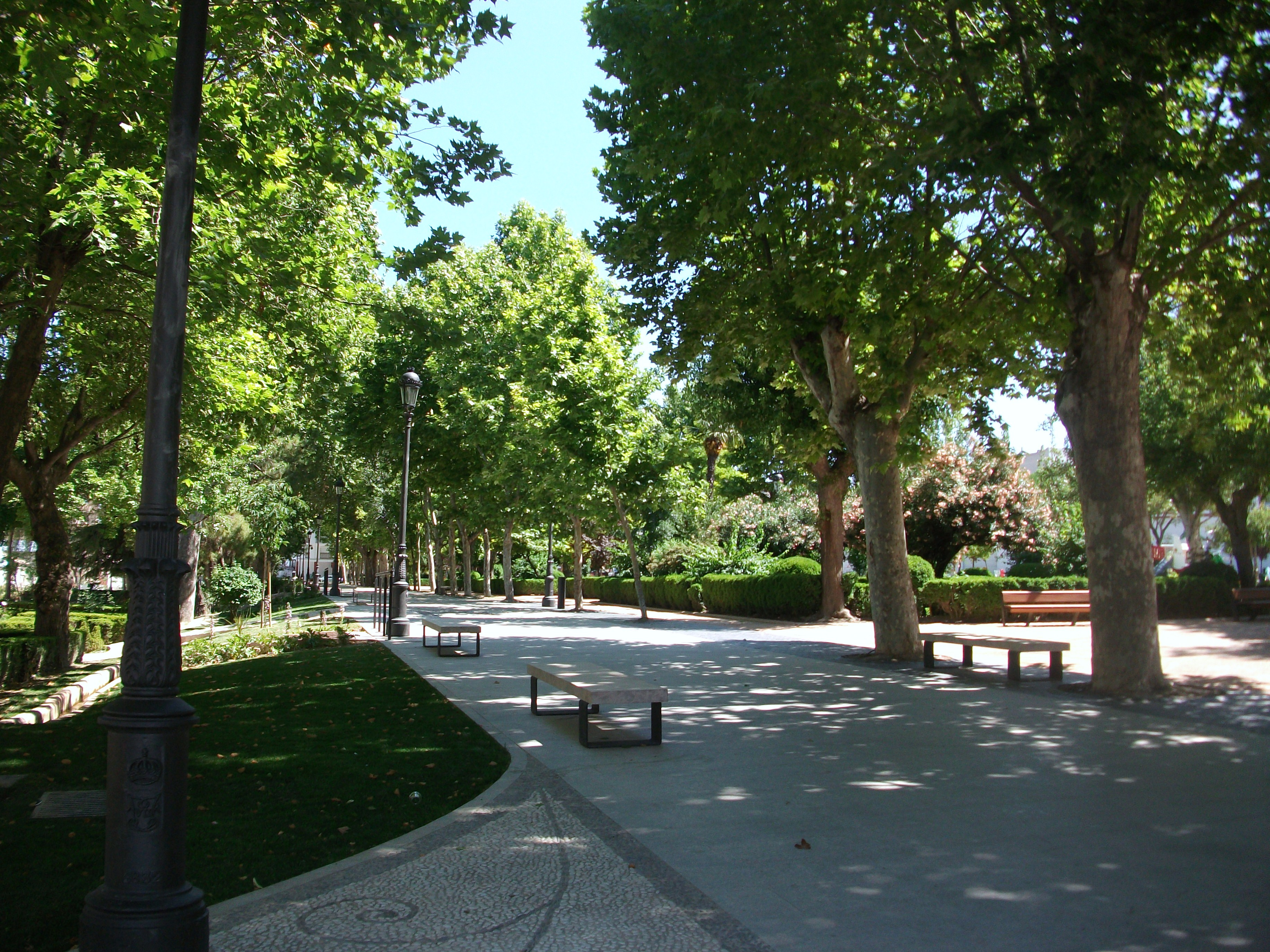 Alameda